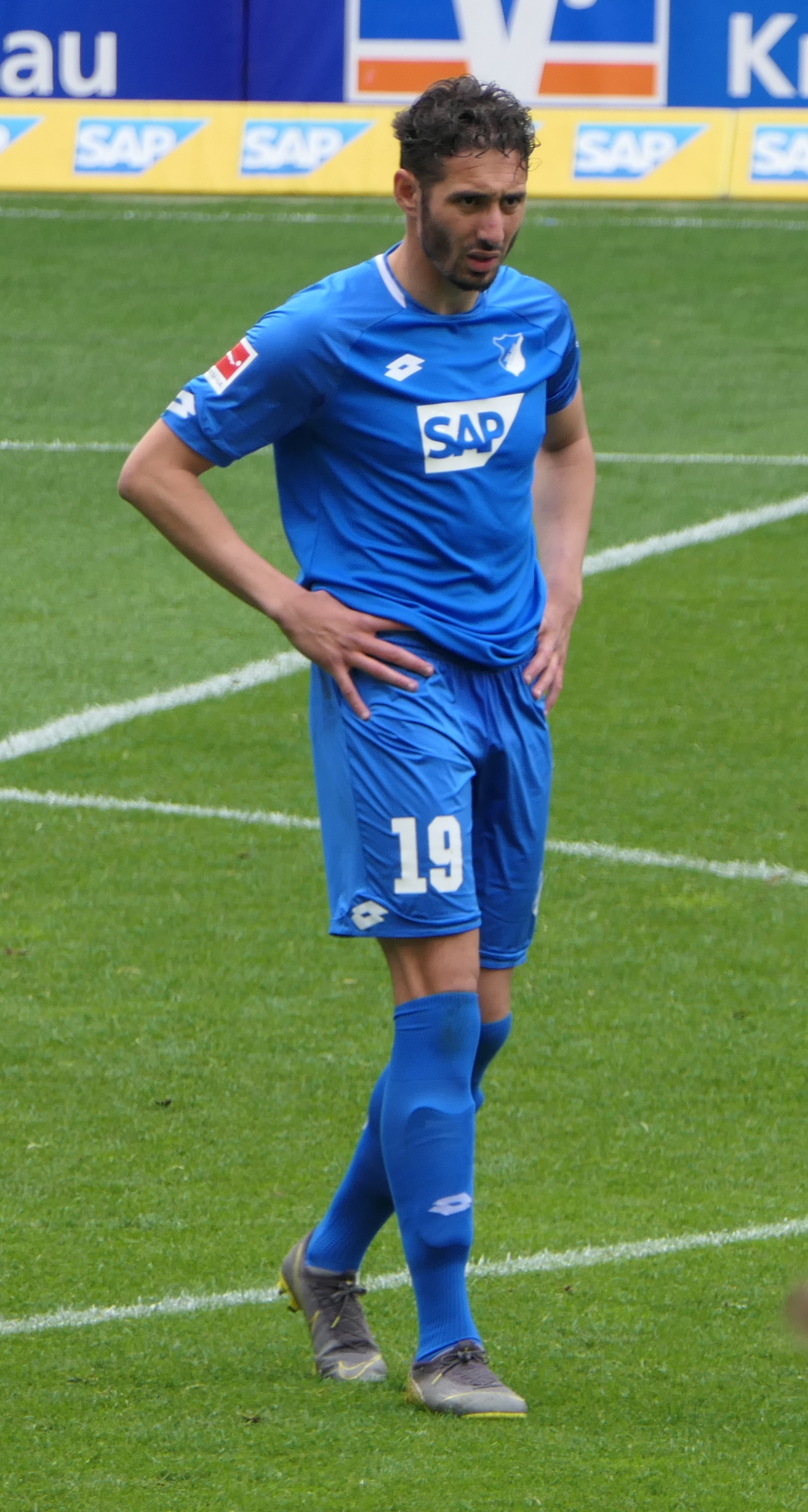 Der Fussballprofi Ishak Belfodil im Trikot der TSG 1899 Hoffenheim beim Heimspiel gegen den SV Werder Bremen am 11.05.2019.